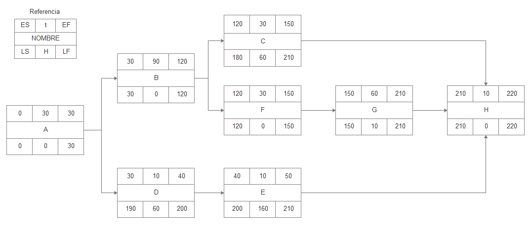 Red PERT